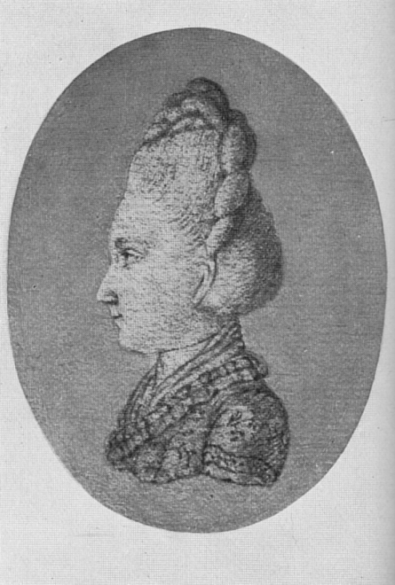 Cornelia Goethe, kolorierter Kupferstich nach Ph.J.Becker, Sammlung Kippenberg Leipzig(1932)